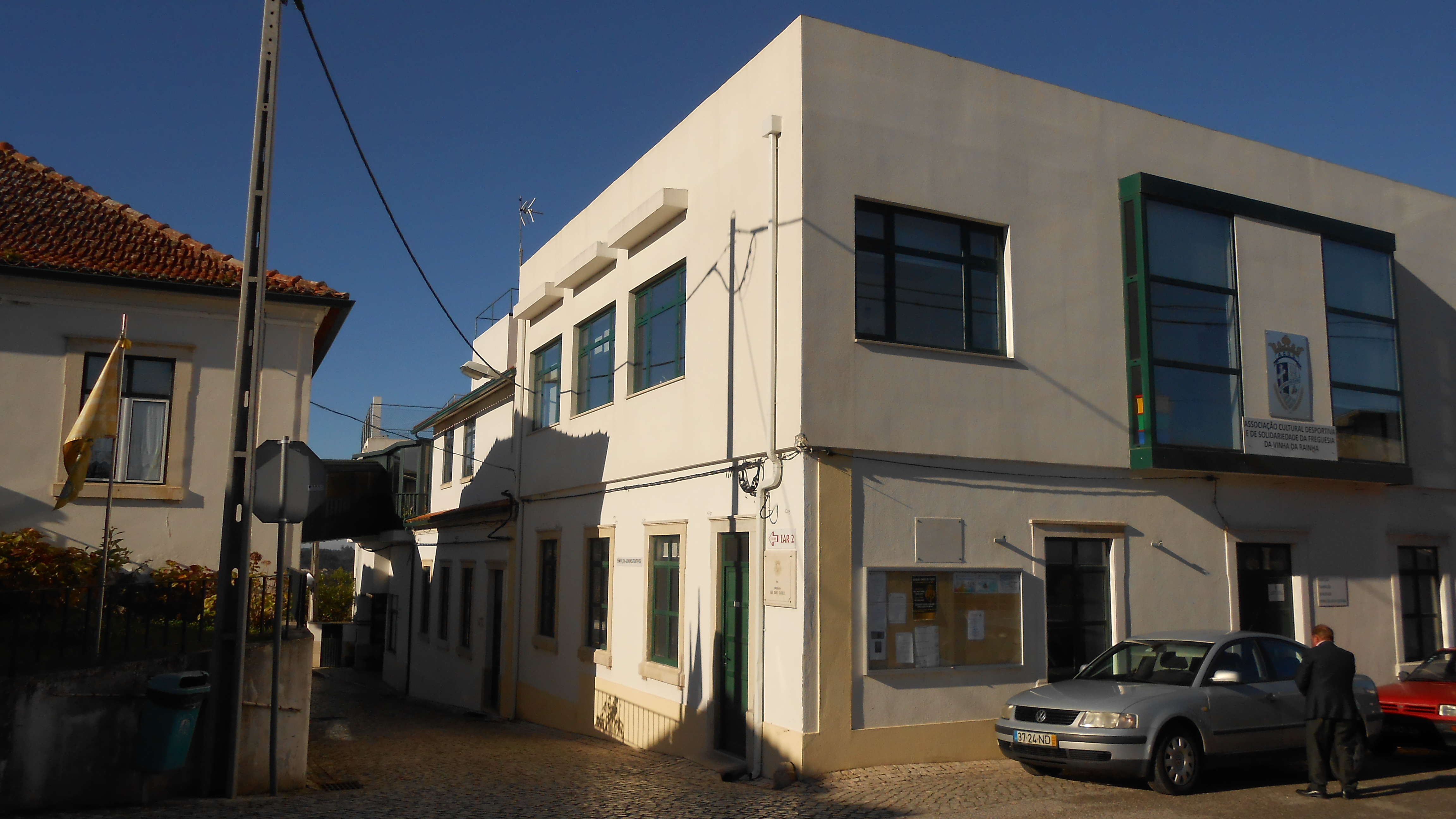 "Verein für Kultur, Sport und Solidarität der Gemeinde Vinha da Rainha" und seine Pflegeeinrichtungen.